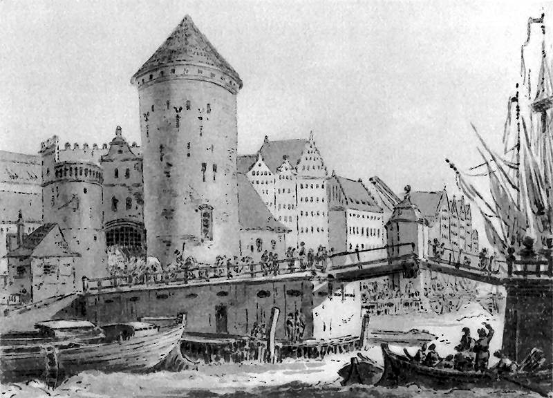 GDAŃSK Brama Mlecznych Stągwi. 1788-1790. Rysunek piórem i pędzlem tuszem. 19,2 x 24,7 cm. Gabinet Rycin Biblioteki Uniwersytetu Warszawskiego. Widok z drugiego brzegu ramienia Motławy na bramę na Wyspie Spichrzów u wylotu ulicy Stągiewnej. Brama późnogotycka z lat 1517-1519 zawdzięcza swą nazwę basztom o charakterystycznym kształcie.